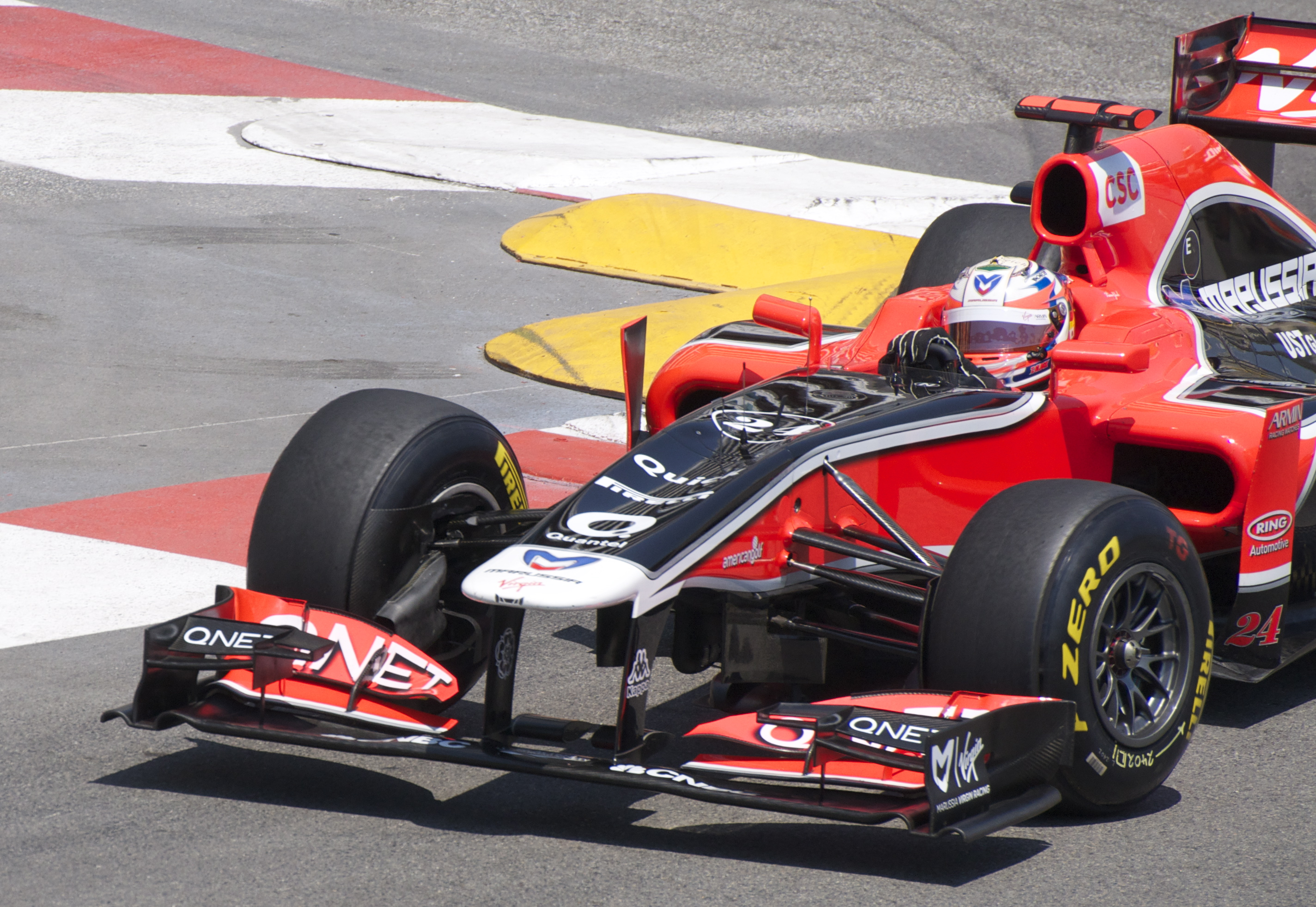 2011 Monaco GP